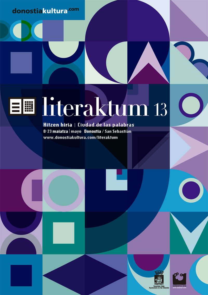 2013ko irudia. Imagen de 2013.